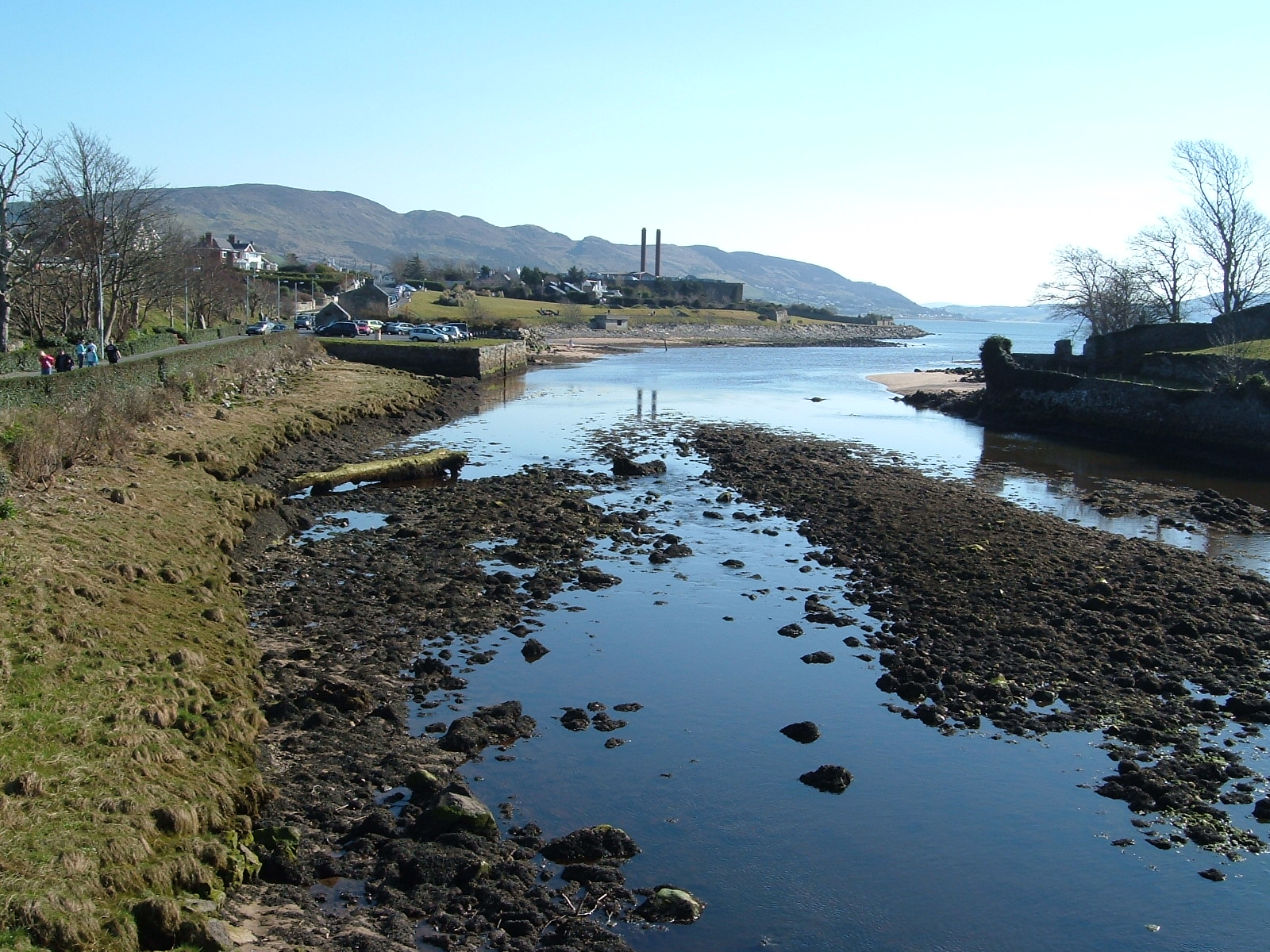 Buncrana desde la desembocadura